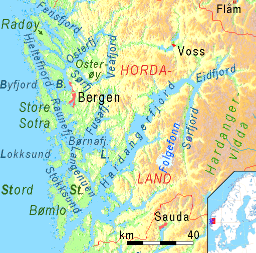 Physical map of Fjords and Sunds around Bergen and Hardangerfjord, showing the position of Fensfjord, Hjeltefjord, Osterøy, Osterfjord, Vedfjord, Sørfjord, Raunefjord,Børnafjord,Lokksund,Langenuen, Stokksund and Bømlo, Hardangerfjord with Sørfjord and Eidfjord.